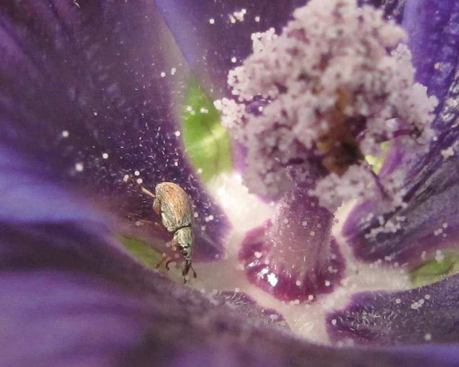 Rüsselkäfer Malvapion malvae an der Basis der Staubblattsäule von Malva sylvestris